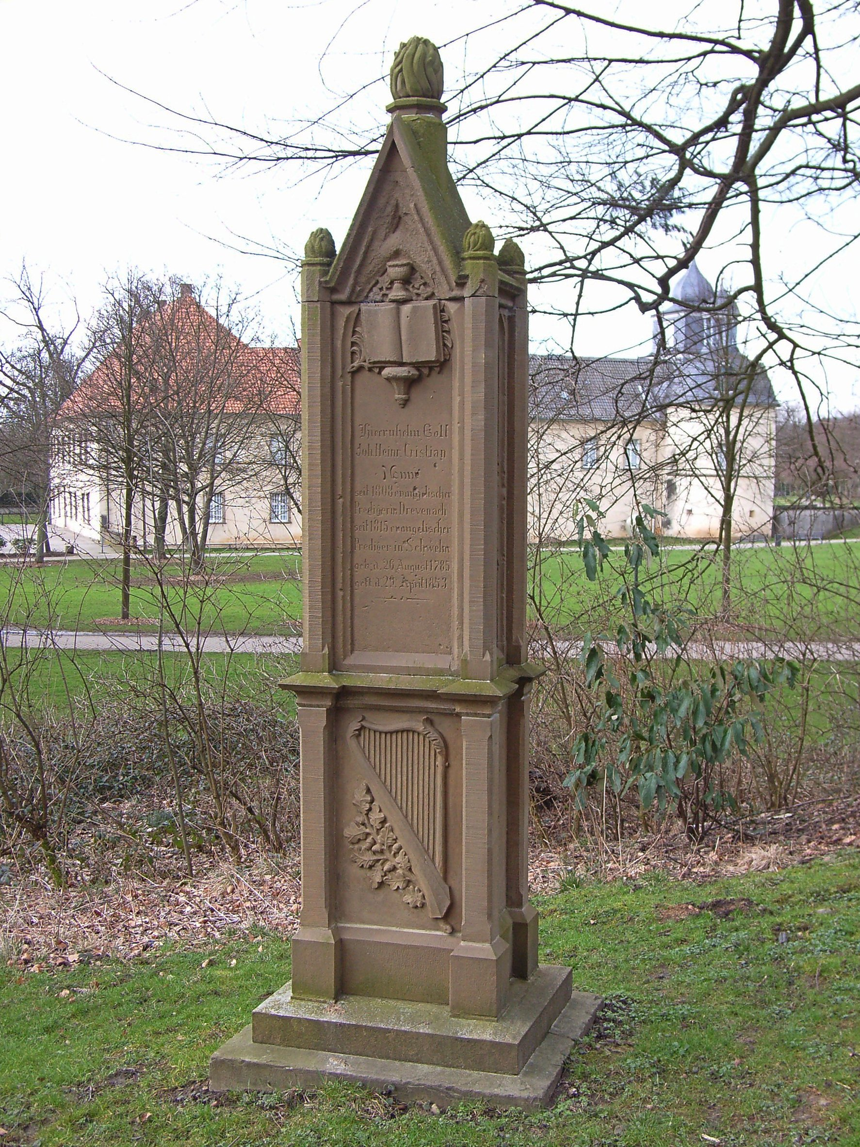 Denkmal des evangelischen Theologen Johann Heinrich Christian Nonne (1785–1853) im Park des Hauses Martfeld (im Hintergrund) in Schwelm, NRW, Deutschland